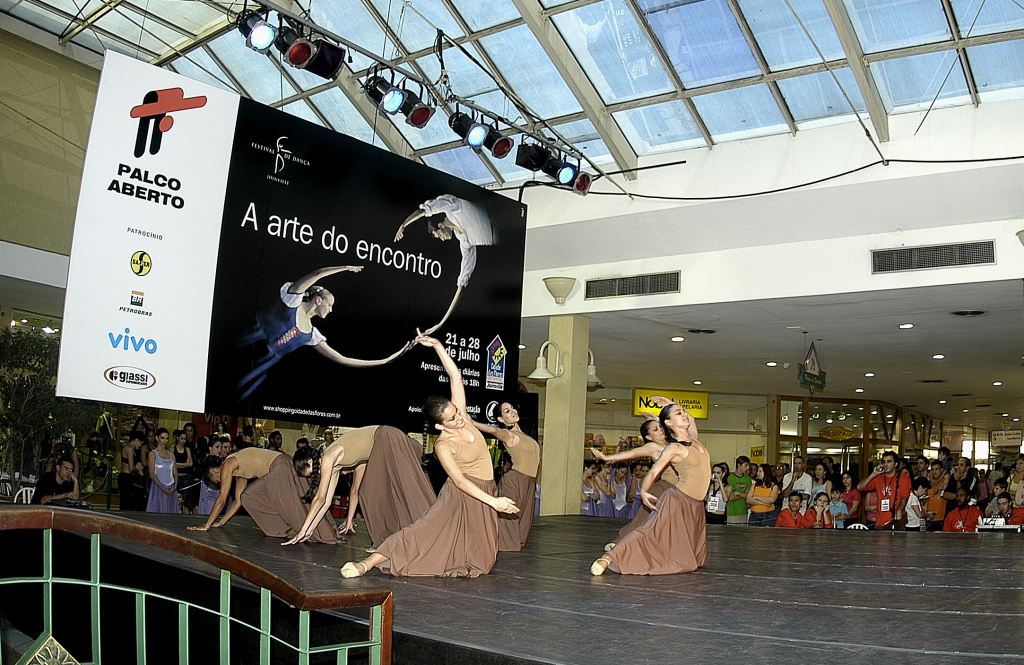 Pórtico de Joinville